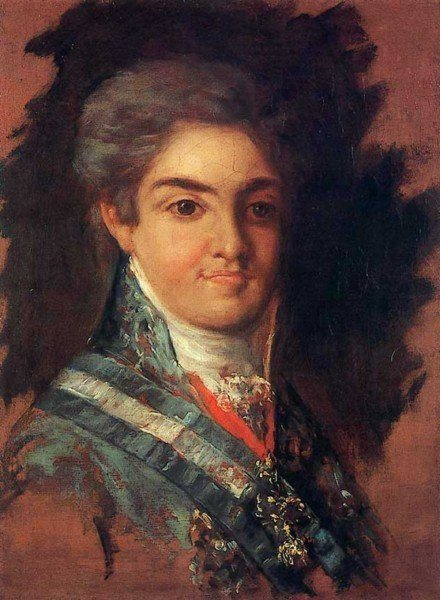 Boceto preparatorio para La familia de Carlos IV